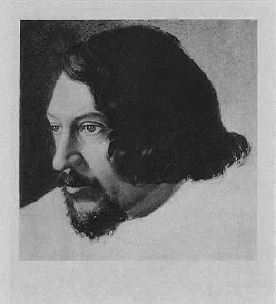 Портрет Алексея Степановича Хомякова (1803-1860) работы Э. А. Дмитриева-Мамонова